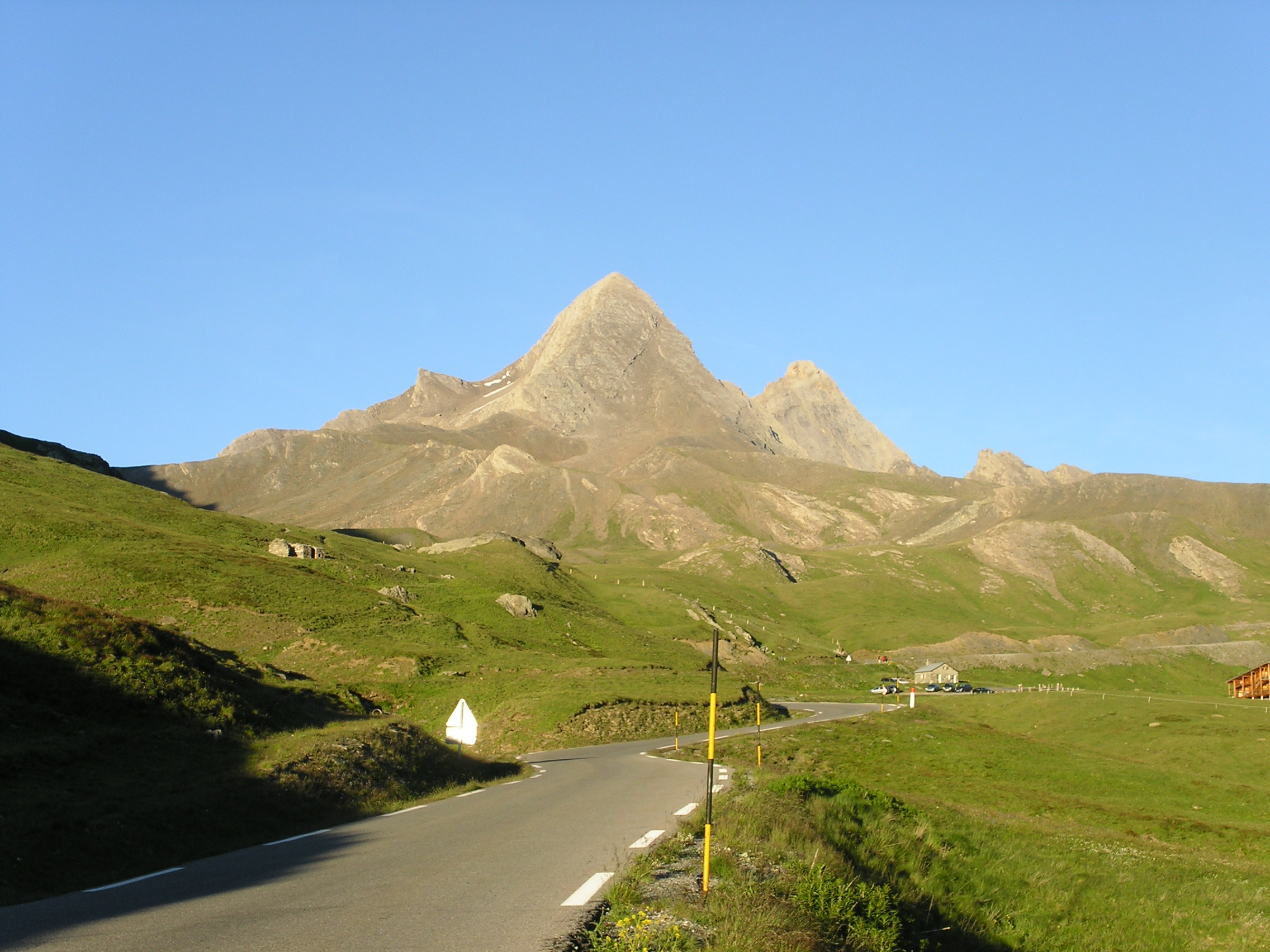 Colle dell' Agnello (Col Agnel)